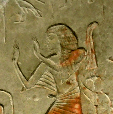 Stèle de Sétaou, gouverneur de Nubie, v. 1250 av. J.-C. (XIX° dyn.), Calcaire.